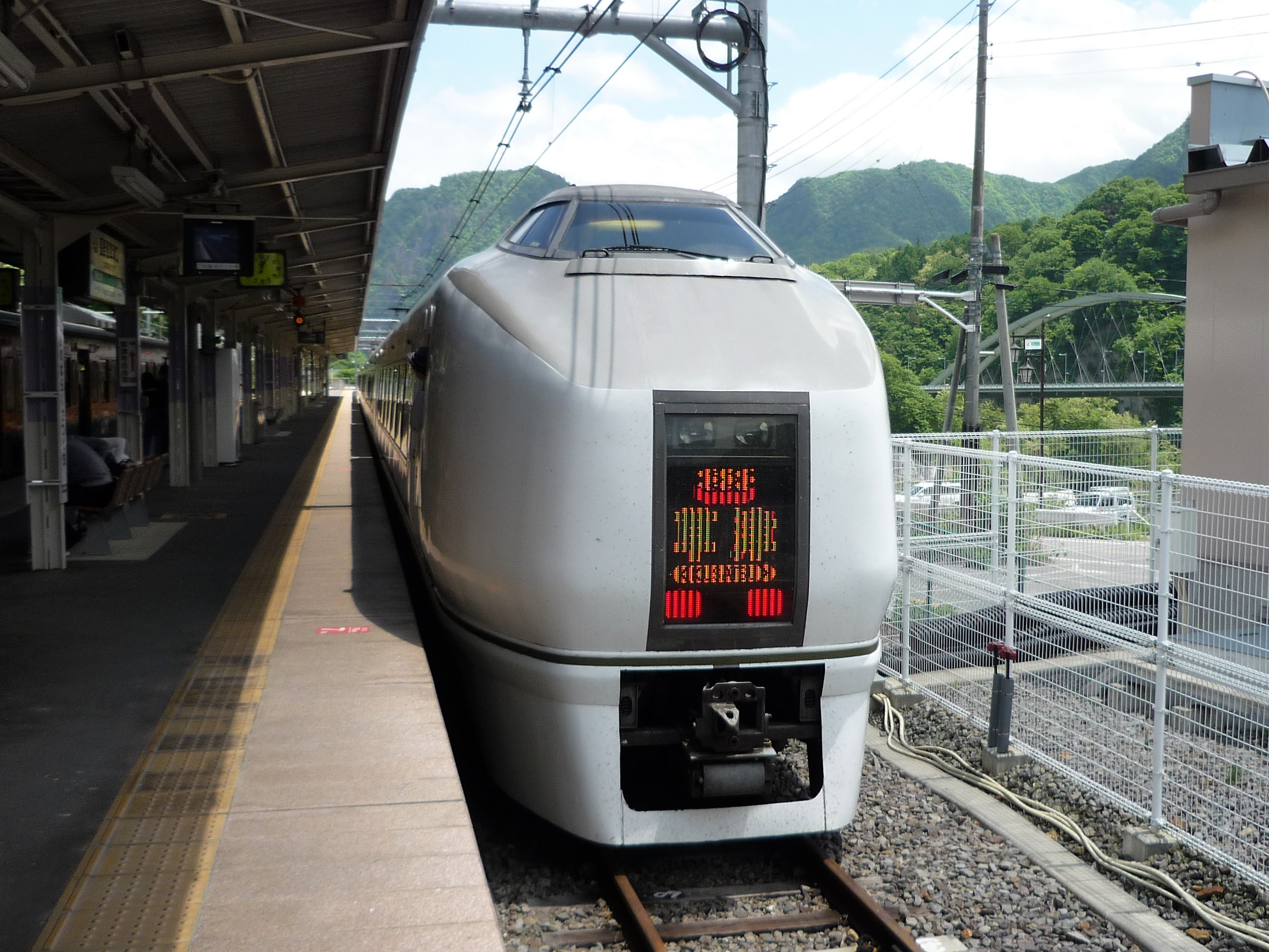 吾妻線長野原草津口駅1番線を発車する651系特急「草津32号」